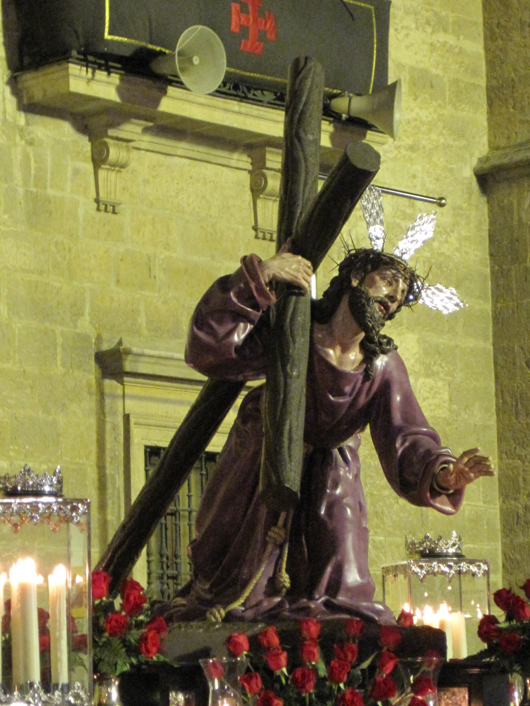 Cristo Camino del Calvario. Cofradía del Santo Cristo del Despojo, Valladolid (España).